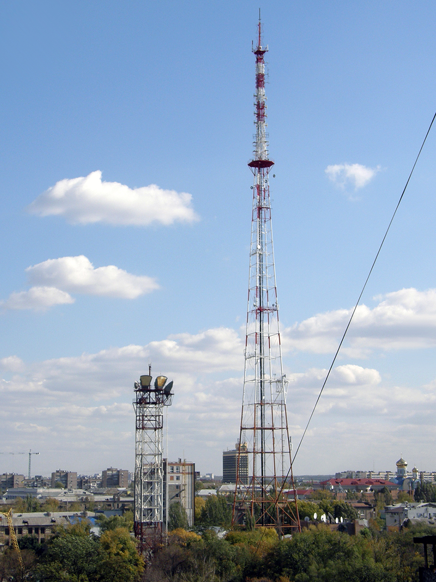 2012 г.